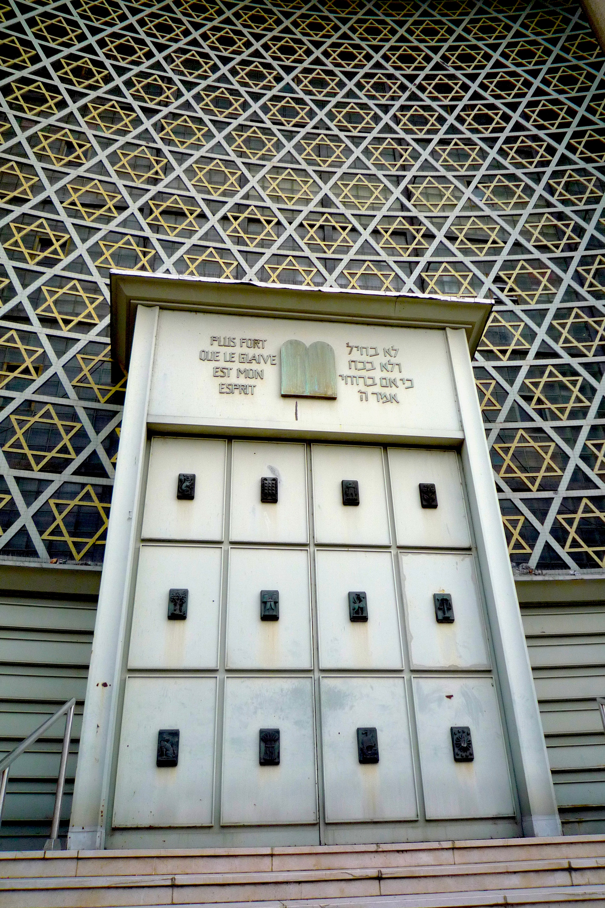 Strasbourg grande synagogue de la Paix, 2011